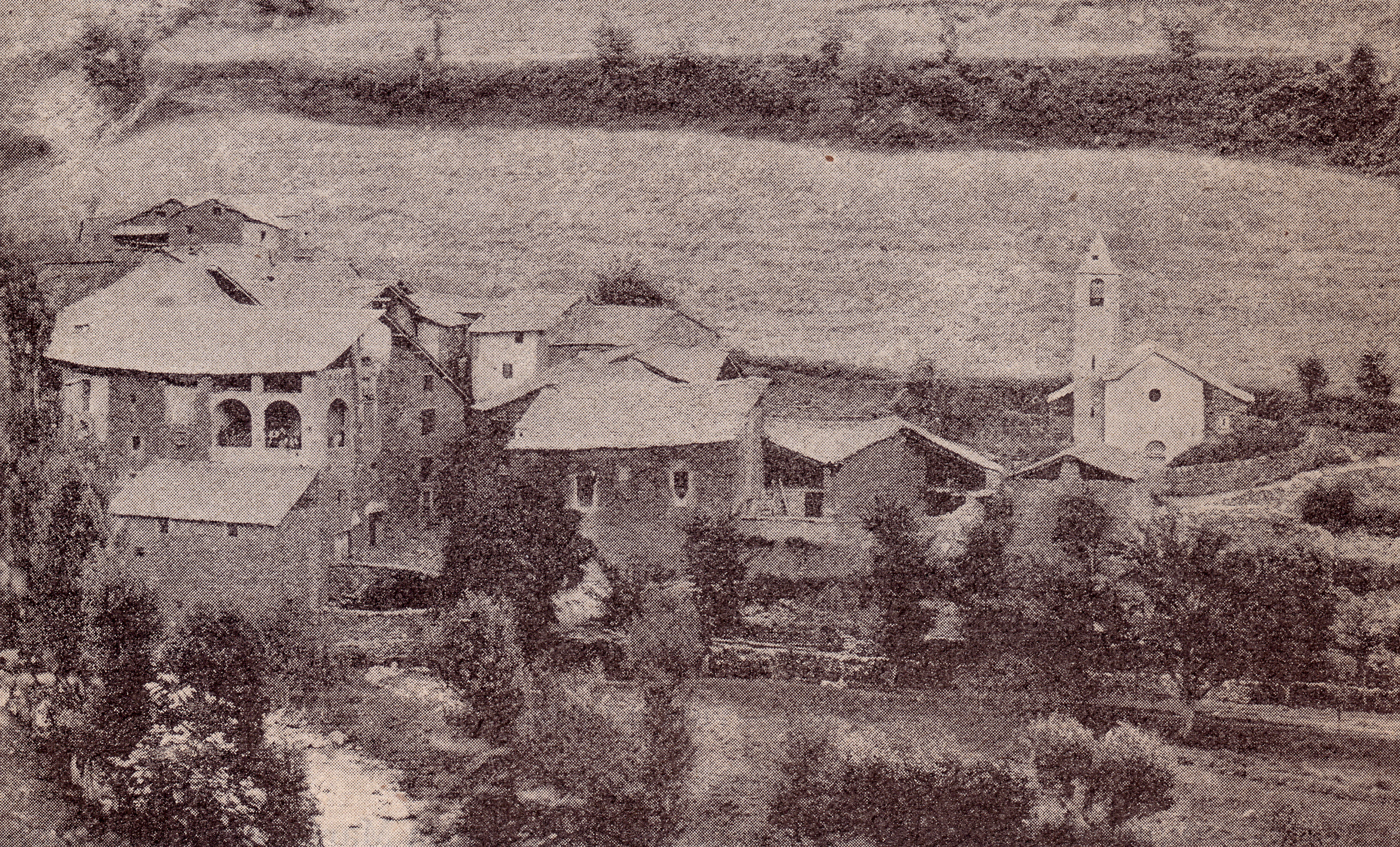 El poble de la Torre de Cabdella vers el 1910 (Pallars Jussà)